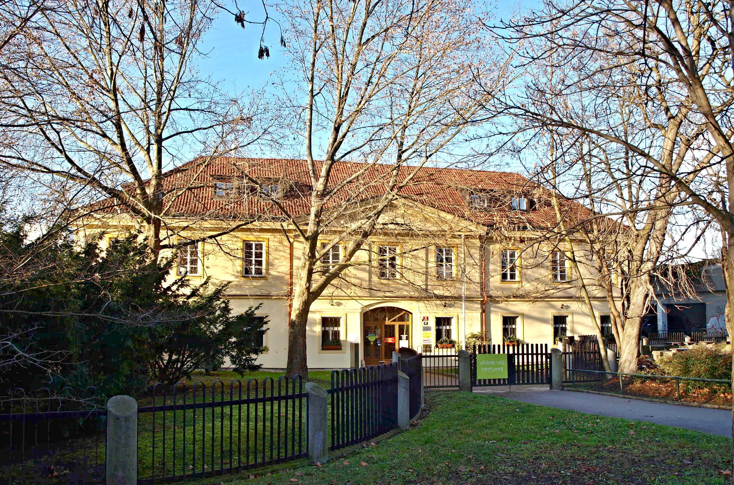 Strašnice, Bečvářův dvůr